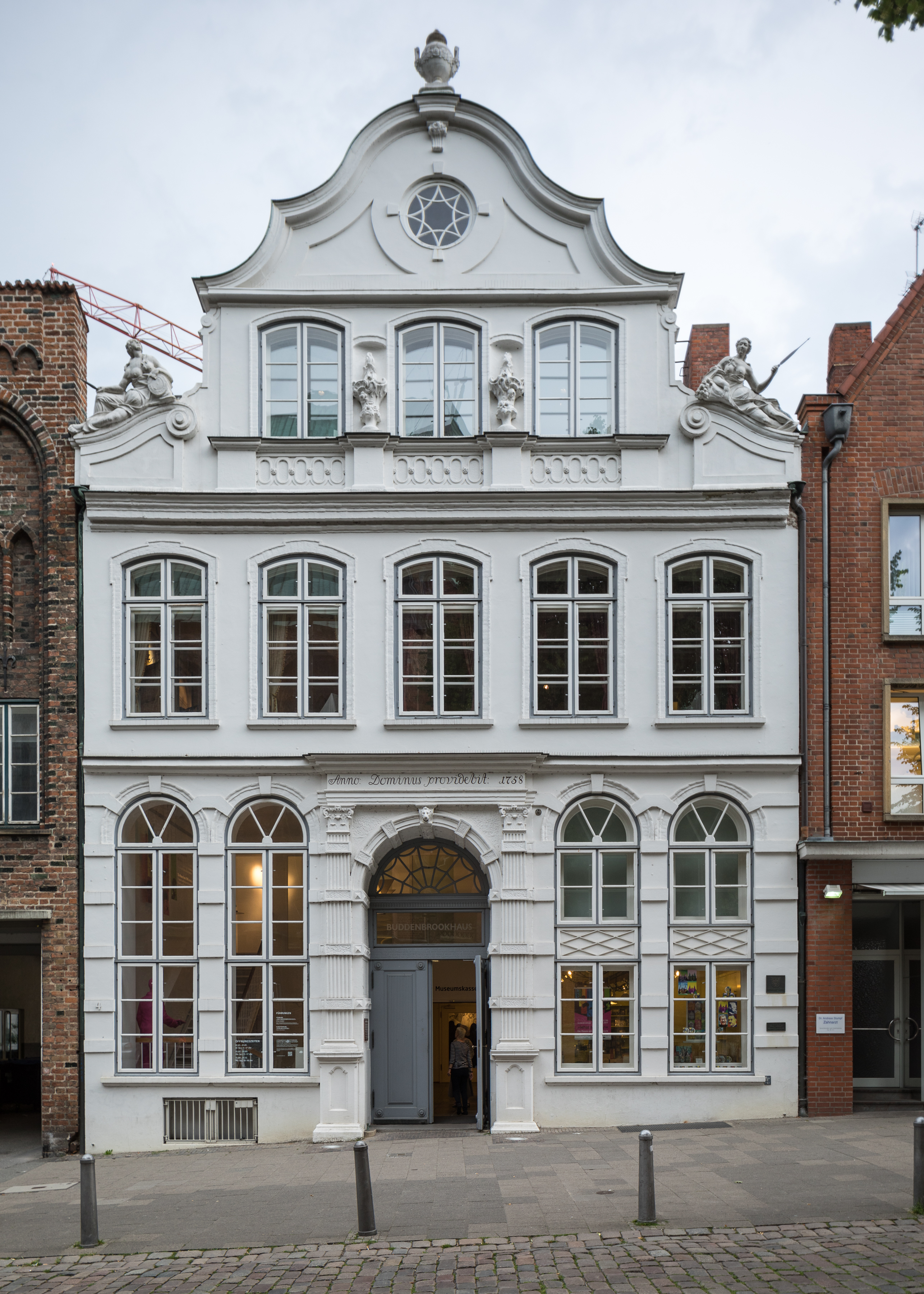 Buddenbrookhaus in Lübeck